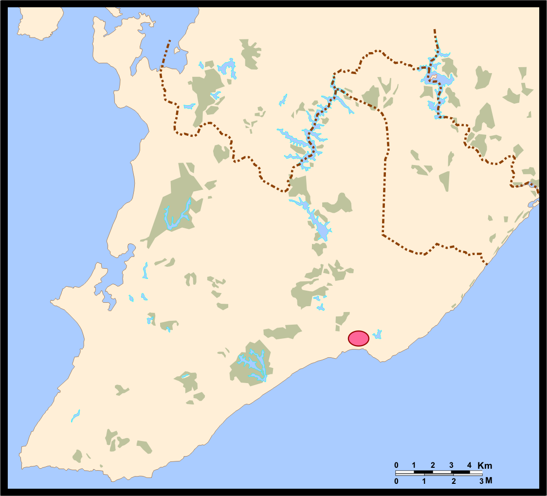 Mapa de Salvador (Bahia, Brazil) - Localização do bairro de Itapuã